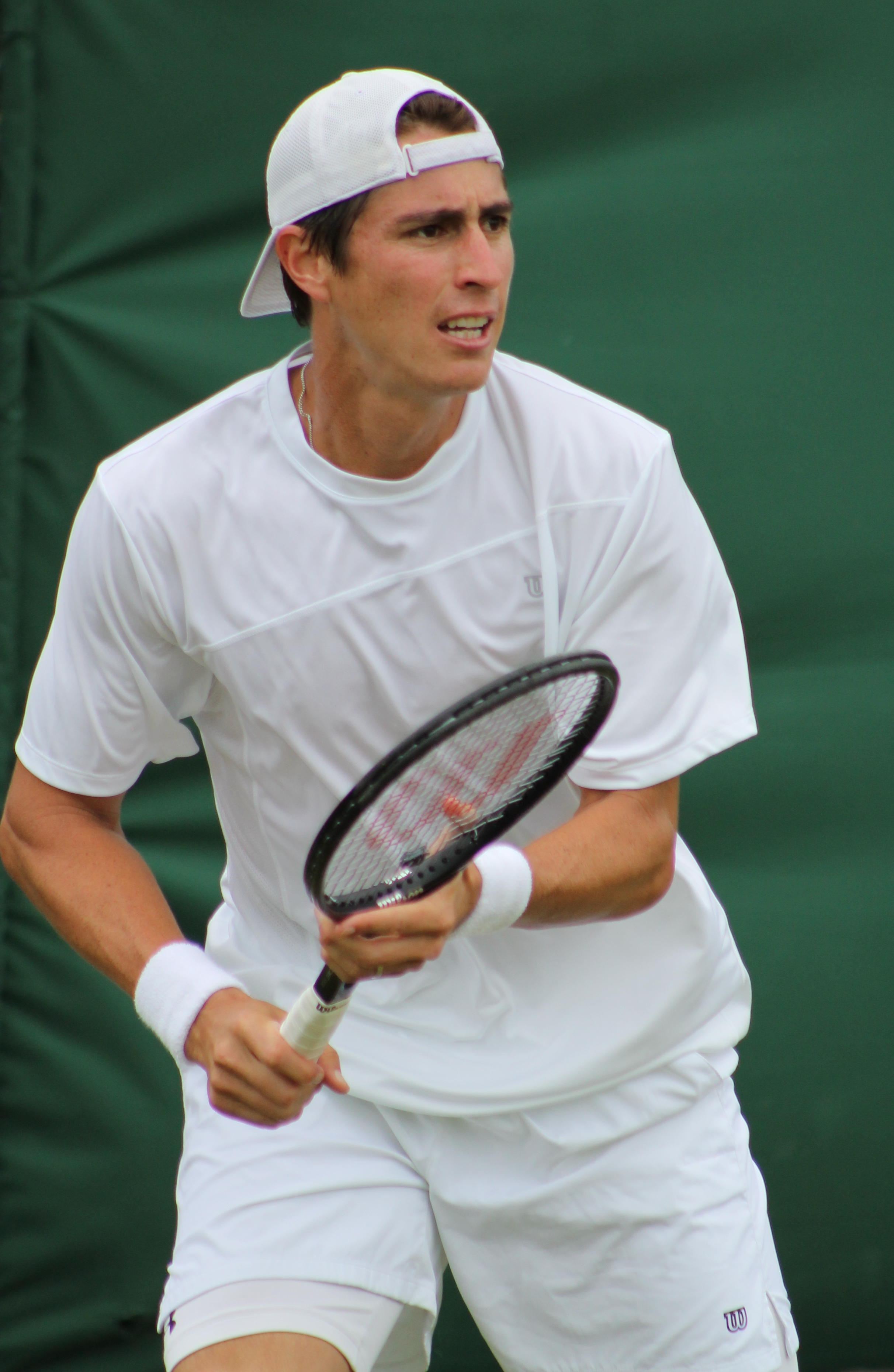 Lapentti G. WMQ14